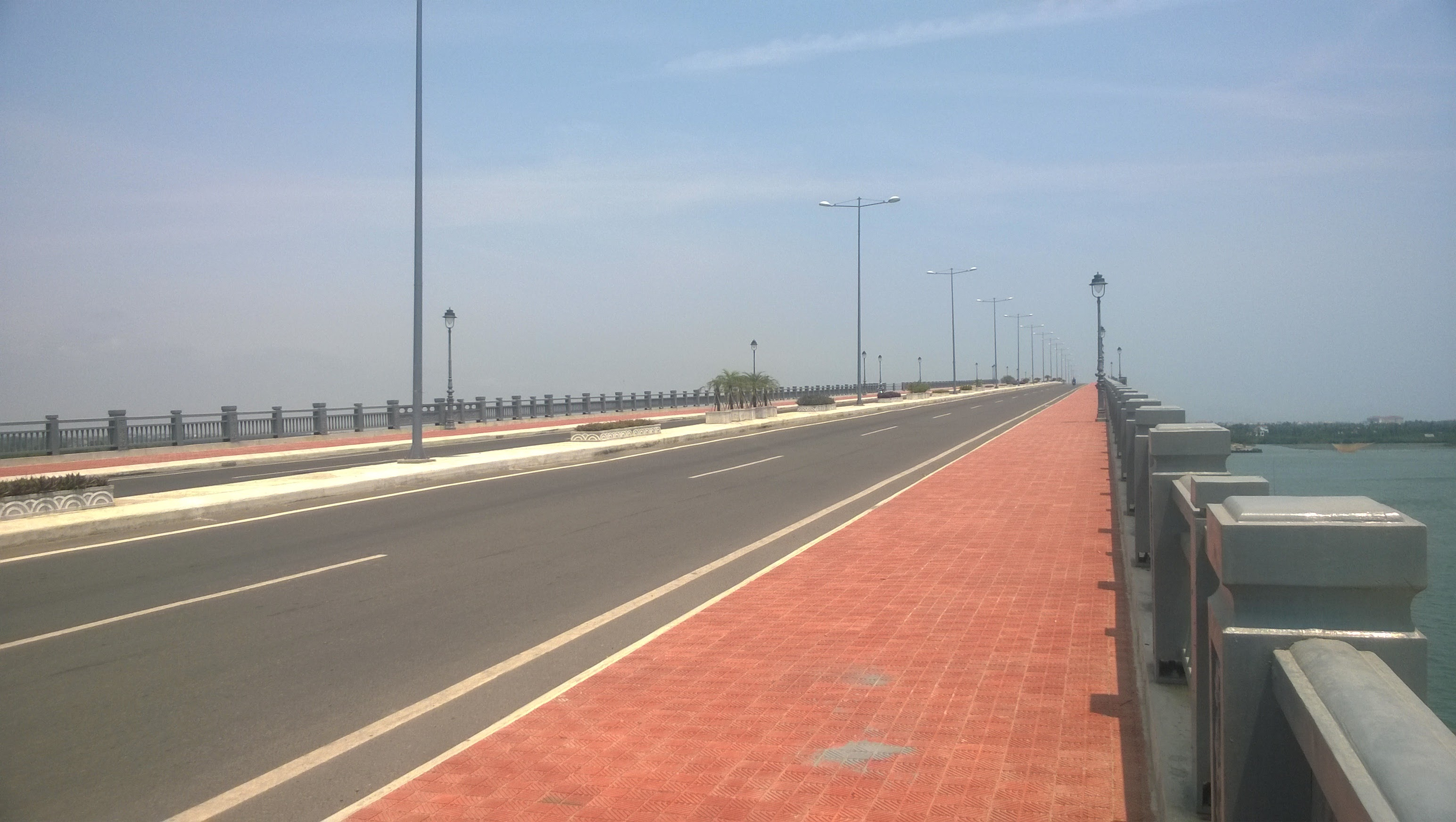 Cầu Cửa Đại, Quảng Nam